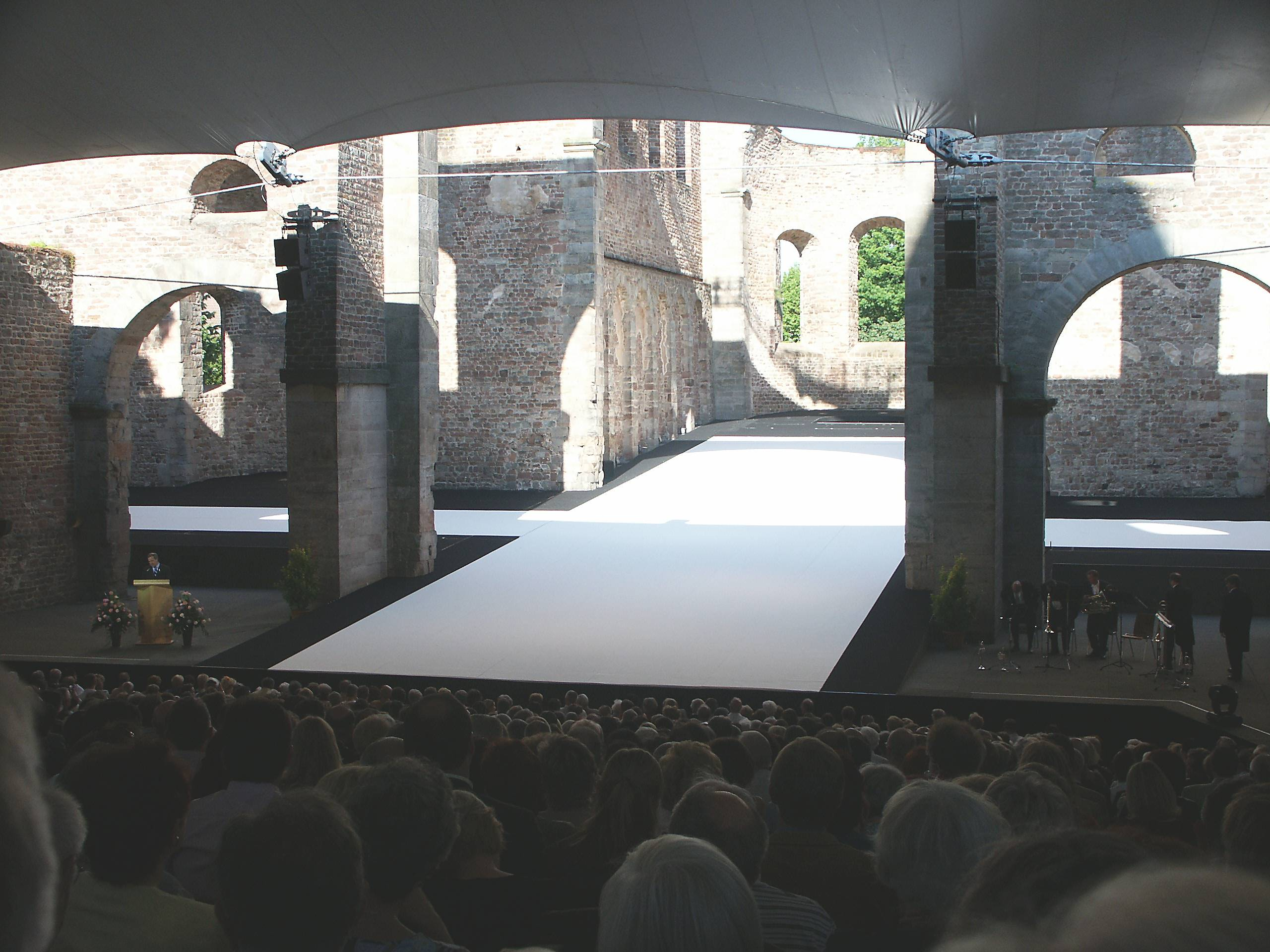 Bühne in der Stiftsruine Bad Hersfeld, aufgenommen bei der Eröffnung der 56. Festspielsaison durch Dr. Norbert Lammert und Udo Corts